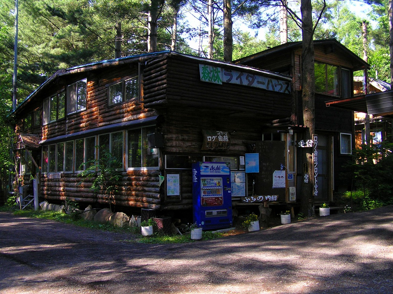 ライダーハウス由縁（yukari）.